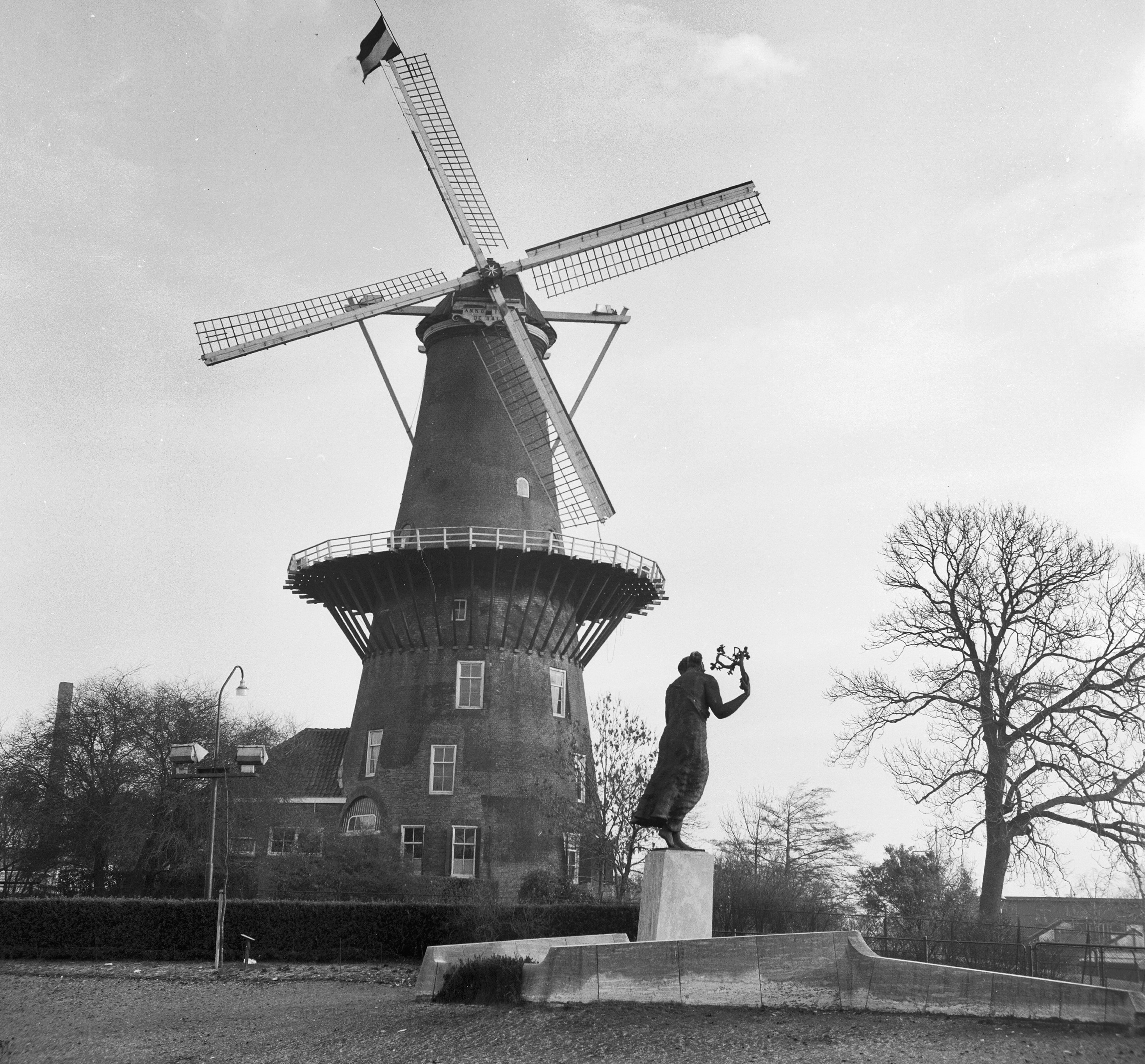 Molens: korenmolen "De Valk" in rouwstand naar aanleiding van bijzetting te Delft van Koningin Wilhelmina